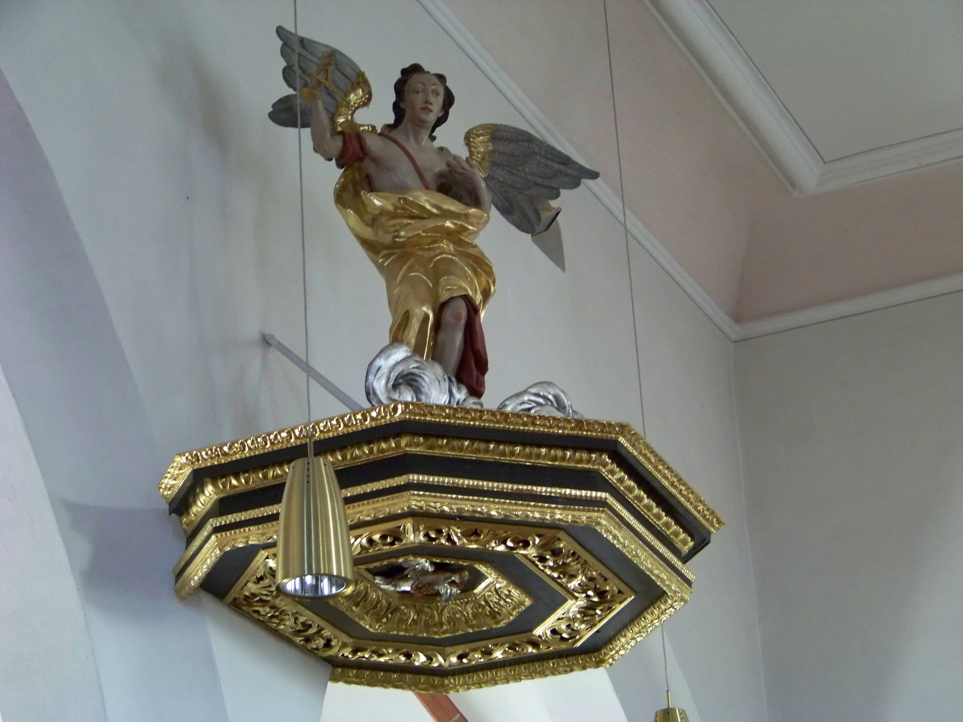 Obersüßbach, Kirchgasse 7, Katholische Pfarrkirche St. Jakobus der Ältere. im Kern romanische Chorturmanlage, spätgotisch verändert, 1877/80 neugotisch erweitert durch Verlängerung nach Westen und Anbau der Seitenschiffe. Kanzeldeckel mit der Figur des Erzengels Michael mit Waage.